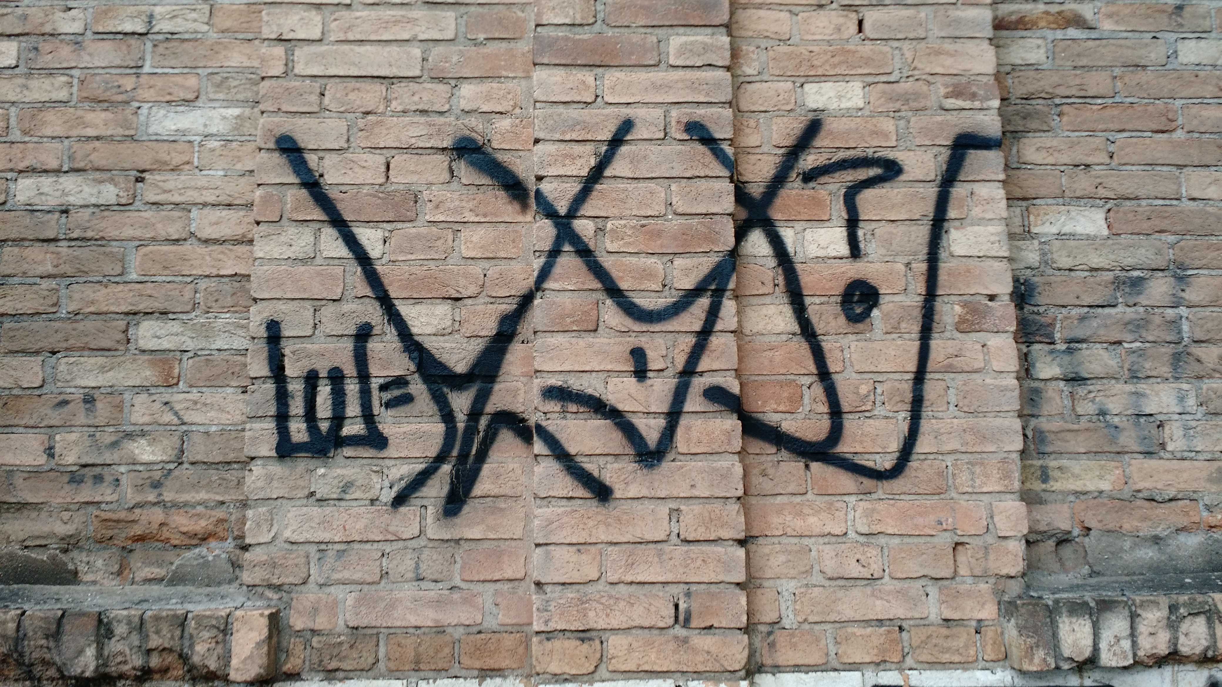 Degradação da área externa dos Moinhos Minetti Gamba